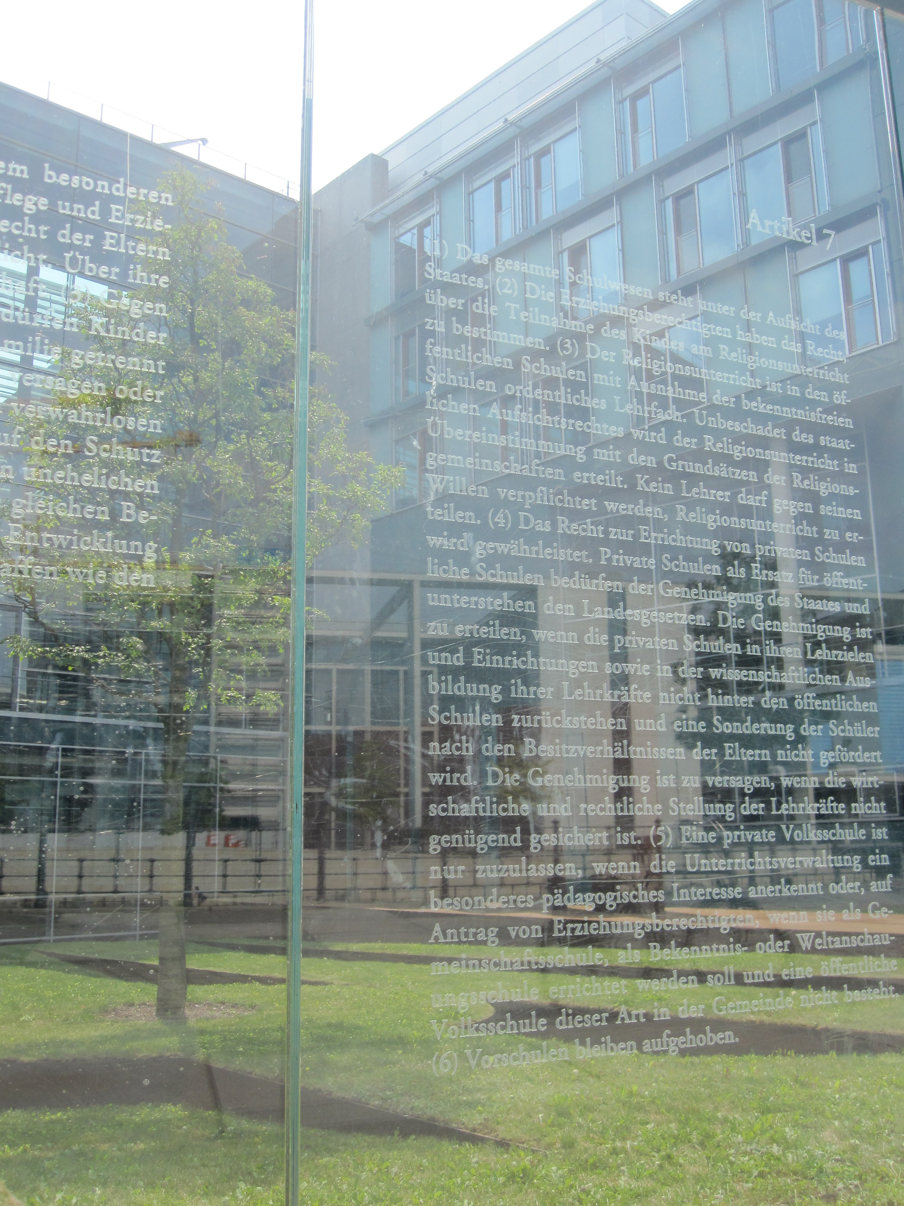 Bundestagsgebäude in Berlin: Der israelische Künstler Dani Karavan hat in drei Meter hohe Glasscheiben, die einen Außenhof des Jakob-Kaiser-Hauses im Uferbereich zur Spree begrenzen, die 19 Grundrechtsartikel des Grundgesetzes mit Laser eingraviert. „Die Grundrechtsartikel schweben gleichsam in Augenhöhe vor dem Haus der Fraktionen, dem Jakob-Kaiser-Haus“ (Andreas Kaernbach, Deutscher Bundestag).